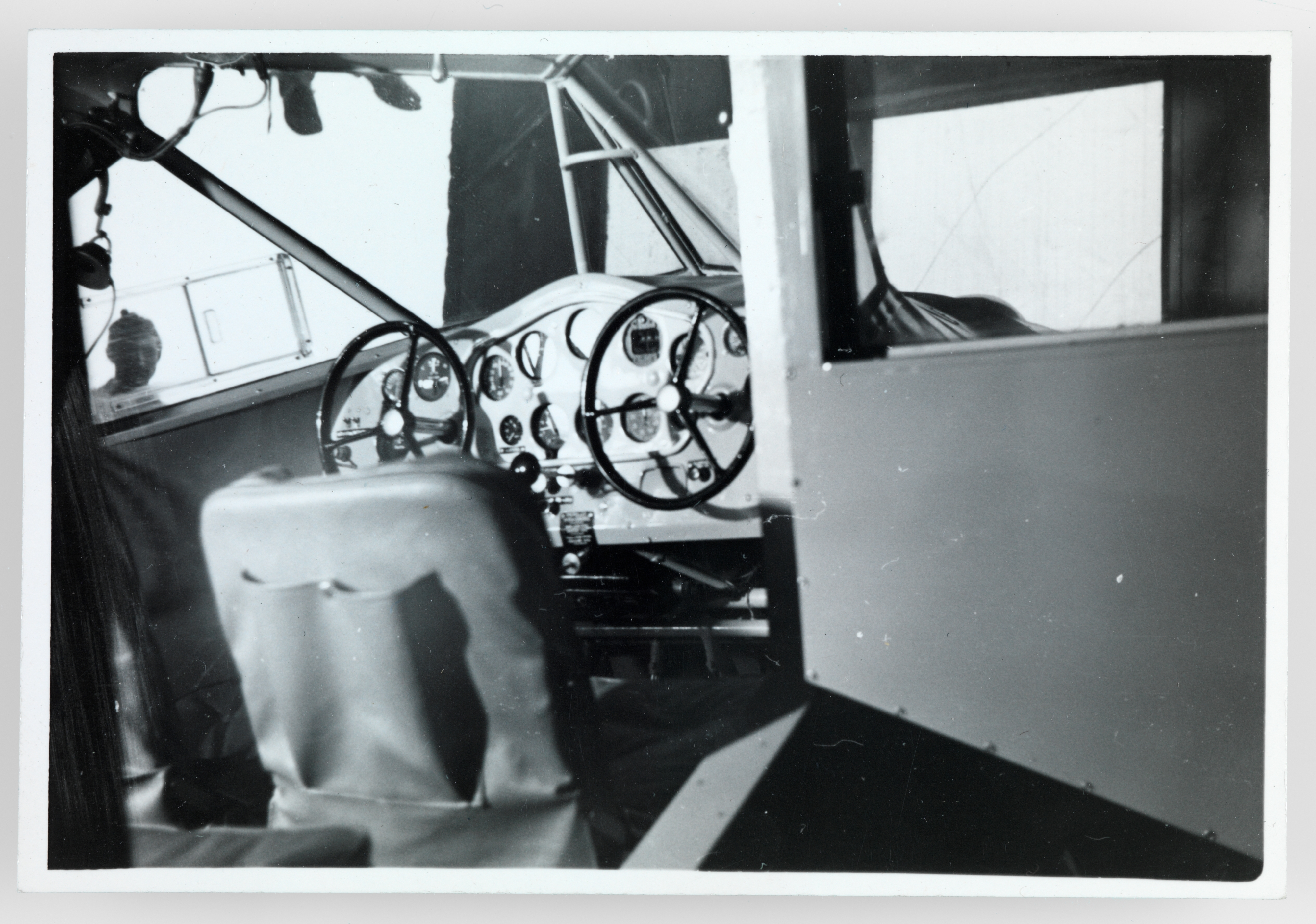 Detalj fra cockpiten til flyet "Hønningstad C-5 Polar".